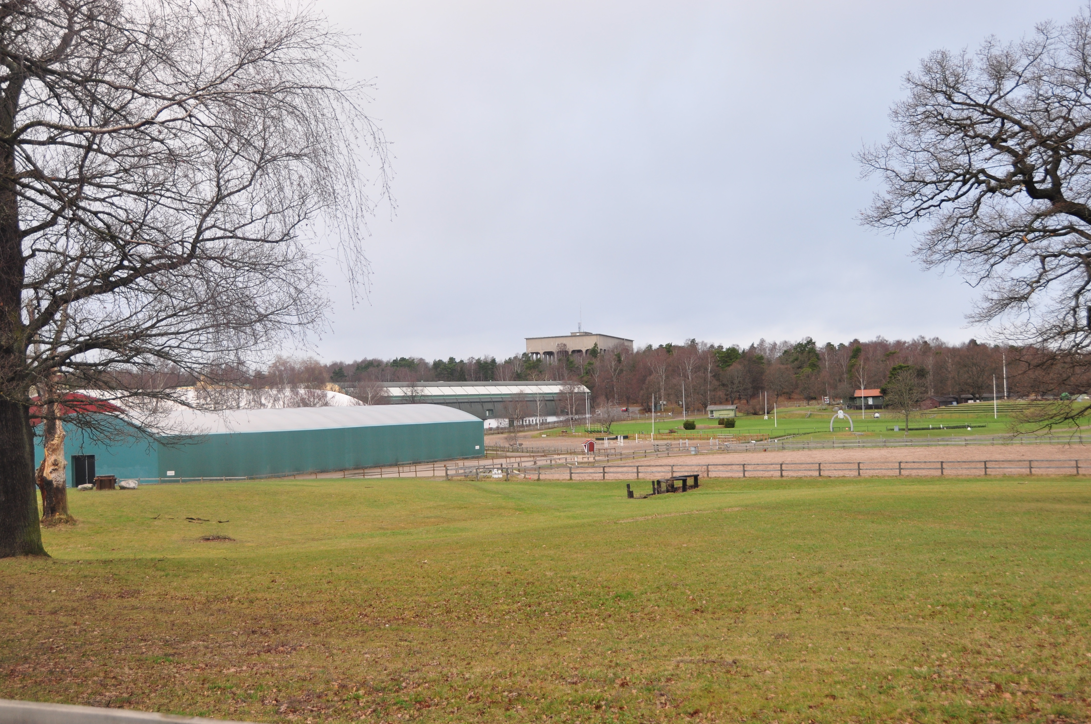 Stockholms fältrittklubbs ridbana vid Storängsvägen